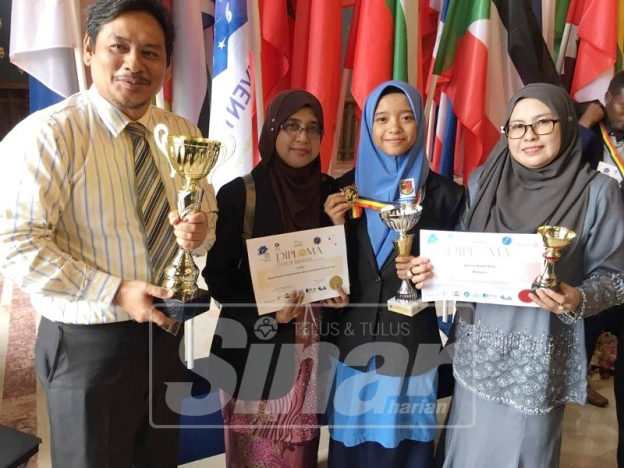 pic